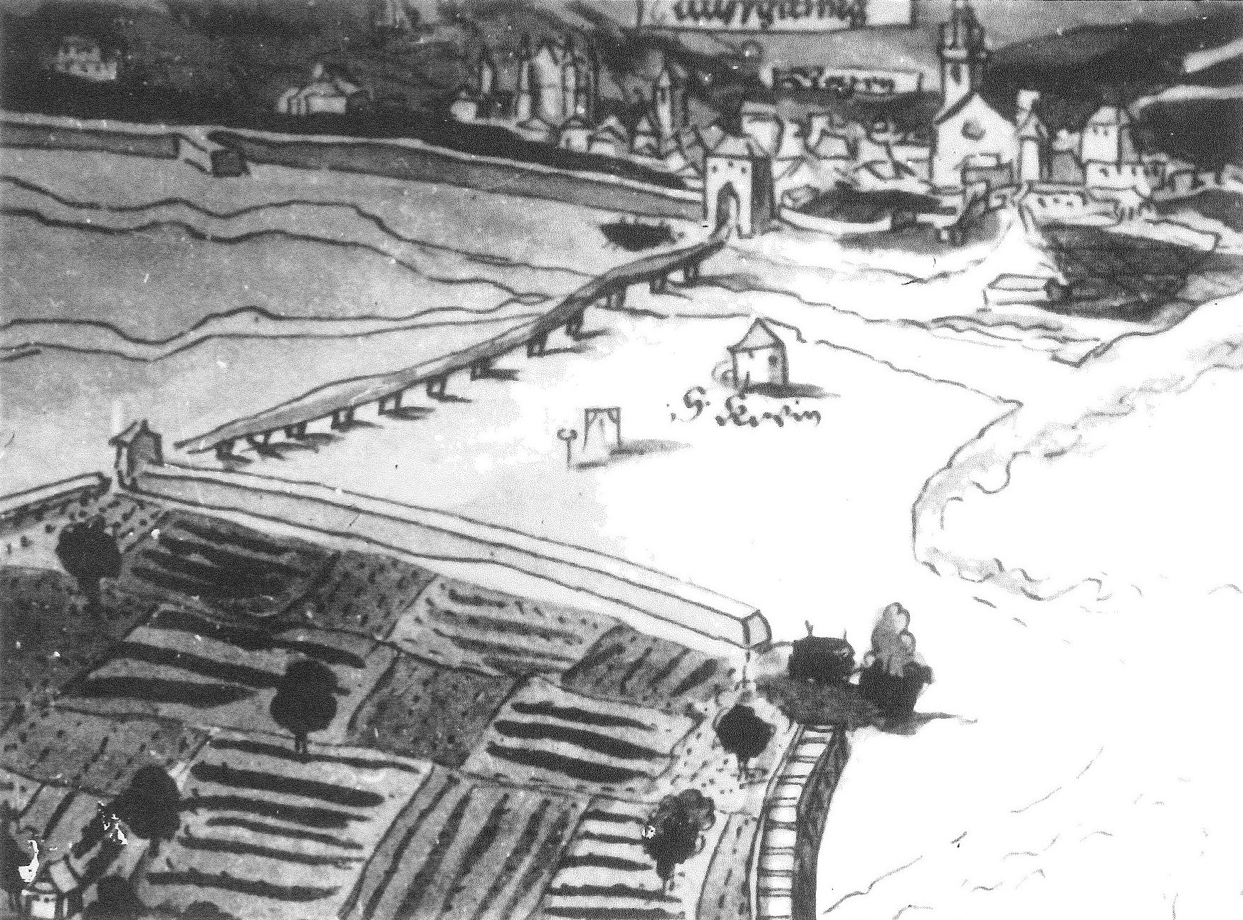 Alte Wassermauer in Quirein (Grauler Wassermauer) auf der Überschwemmungskarte des Jahres 1541 (Ausschnitt). Ebenfalls erkennbar das Kirchlein St. Quirin.